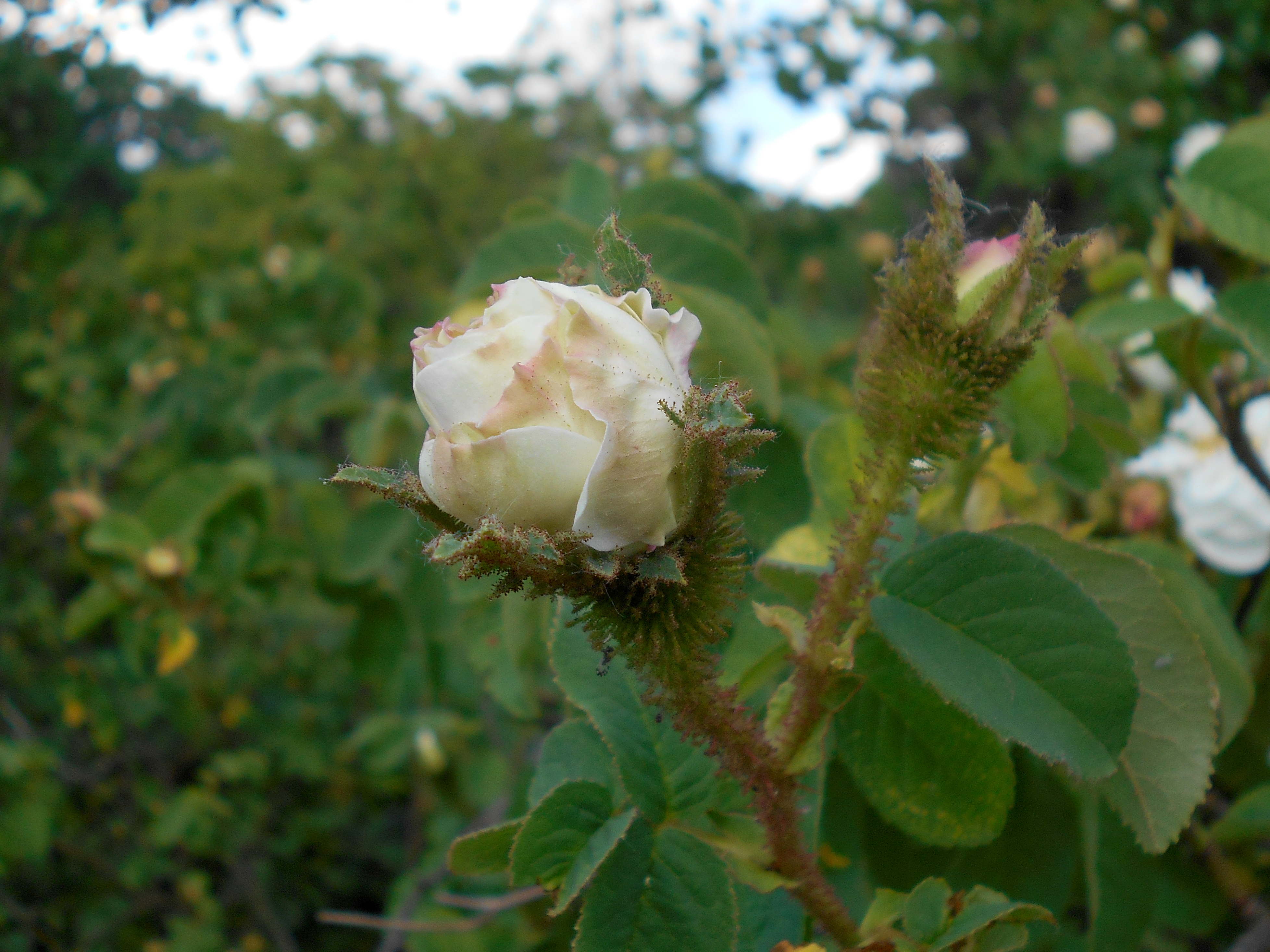 Rosa × centifolia muscosa ‘Comtesse de Murinais’, Botanischer Garten Berlin.